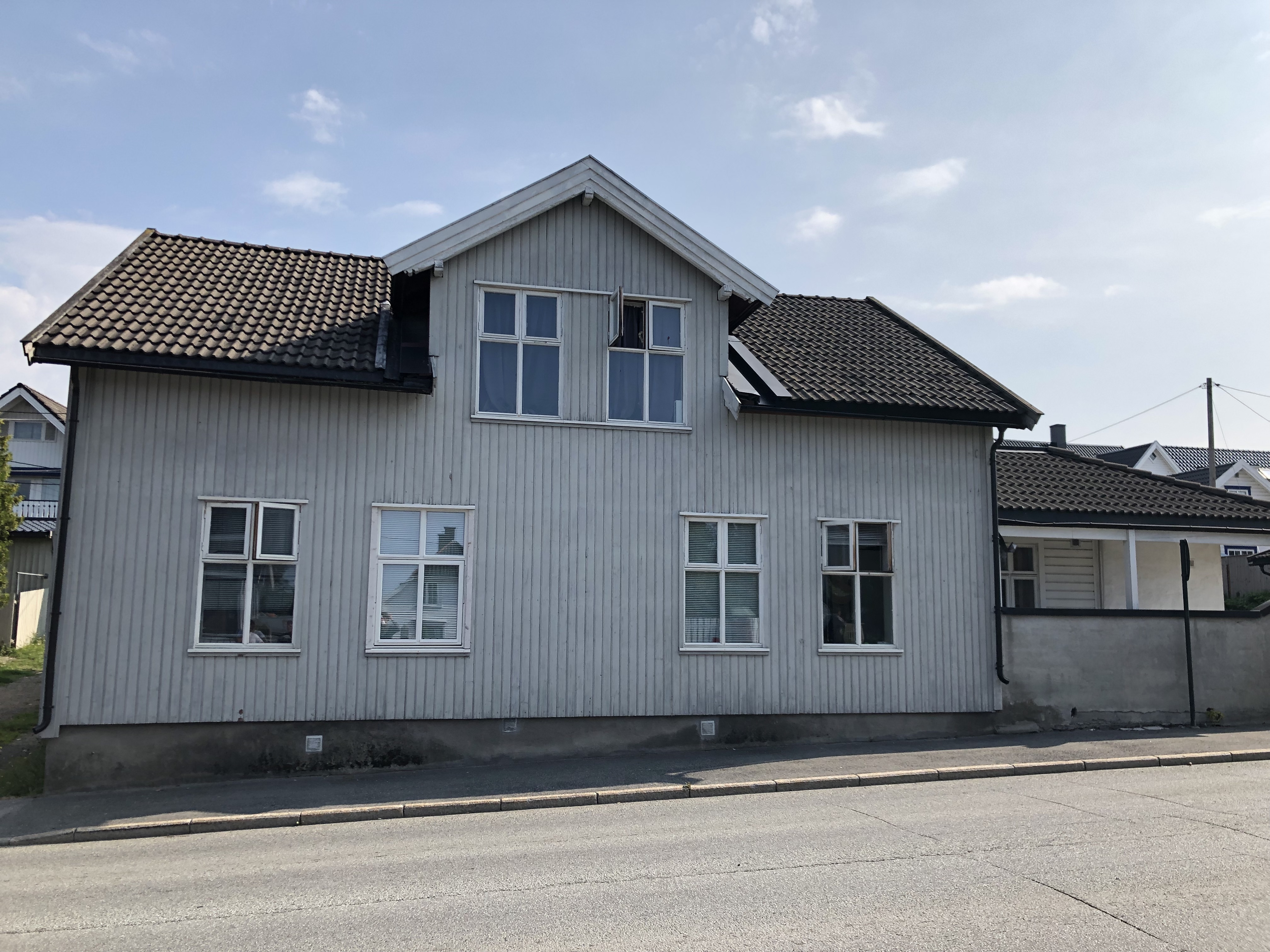 Forsiden av Klostergata 24 i dag